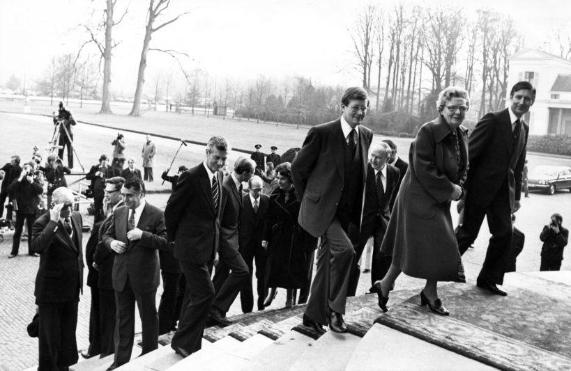 Eerste kabinet Van Agt (1977-1981). De bewindslieden lopen na de beëdiging de trappen van Paleis Soestdijk op. Voorop lopen Koningin Juliana, Wiegel en Van Agt. Soestdijk, 19 december 1977.